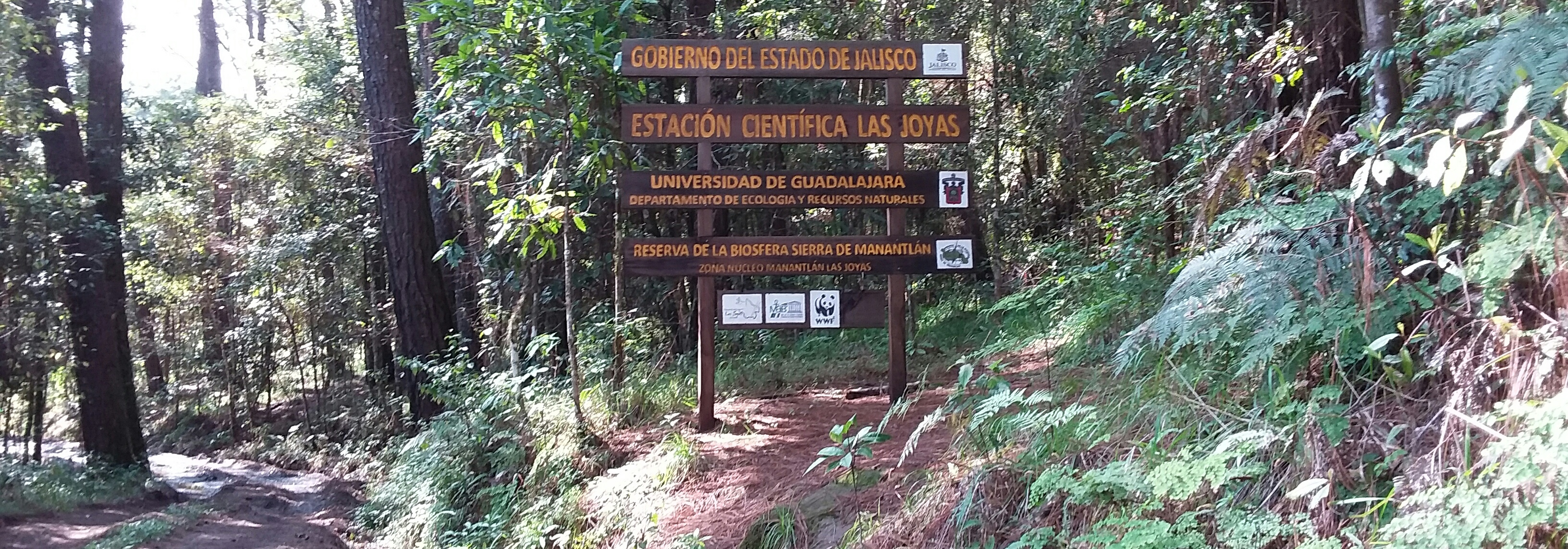 Acceso al centro de investigación biológica de la Universidad de Guadalajara ubicado en la Reserva de la Biosfera Sierra Manantlán. Dicho lugar es un Área natural Protegida dedicado a formar investigadores en el manejo de recursos naturales.